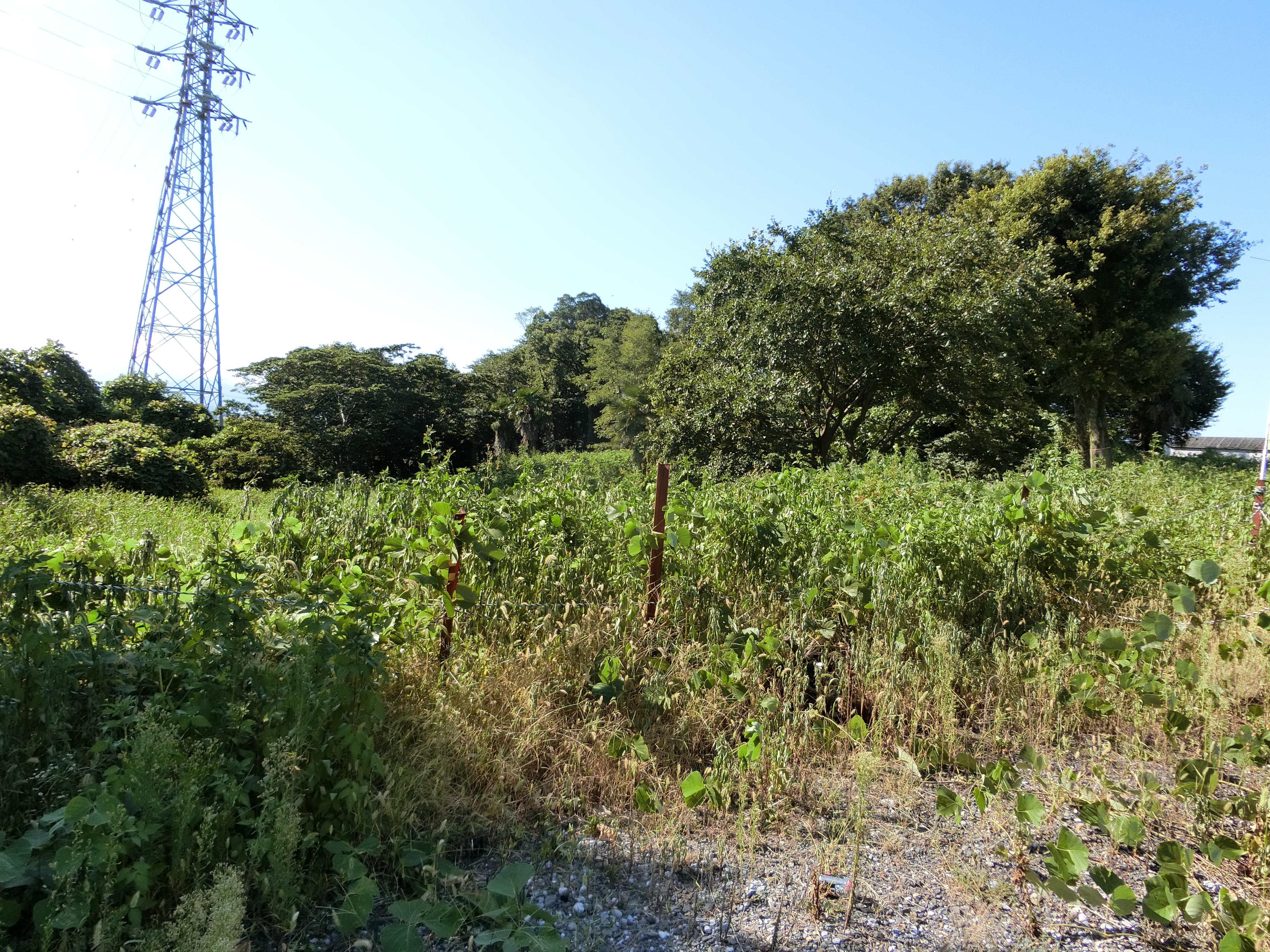 弥生時代の遺跡、東町田遺跡にある墳墓群。国指定史跡